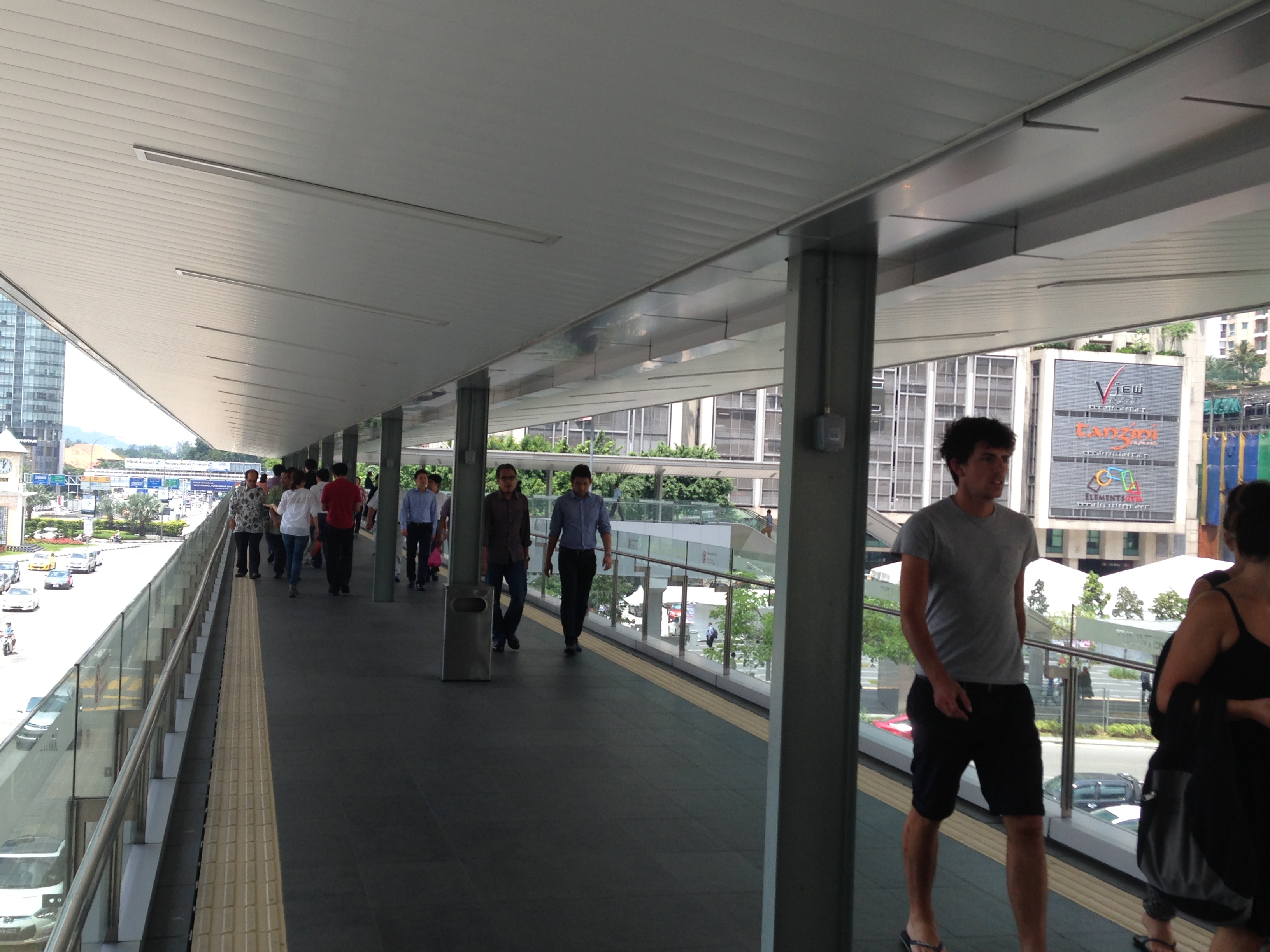 Inside Jalan Tun Razak Skybridge